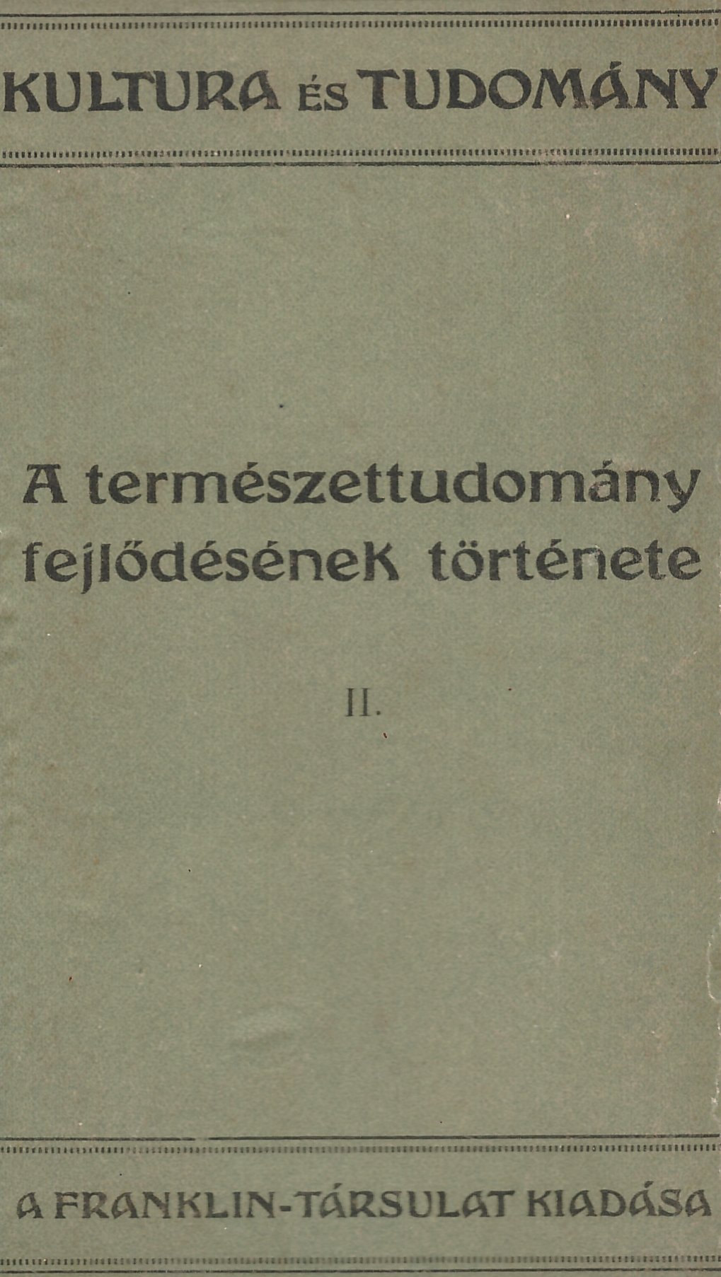 Wilhelm Bölsche (1861-1939): A természettudomány fejlődésének története (1920-as évekbeli kiadás)